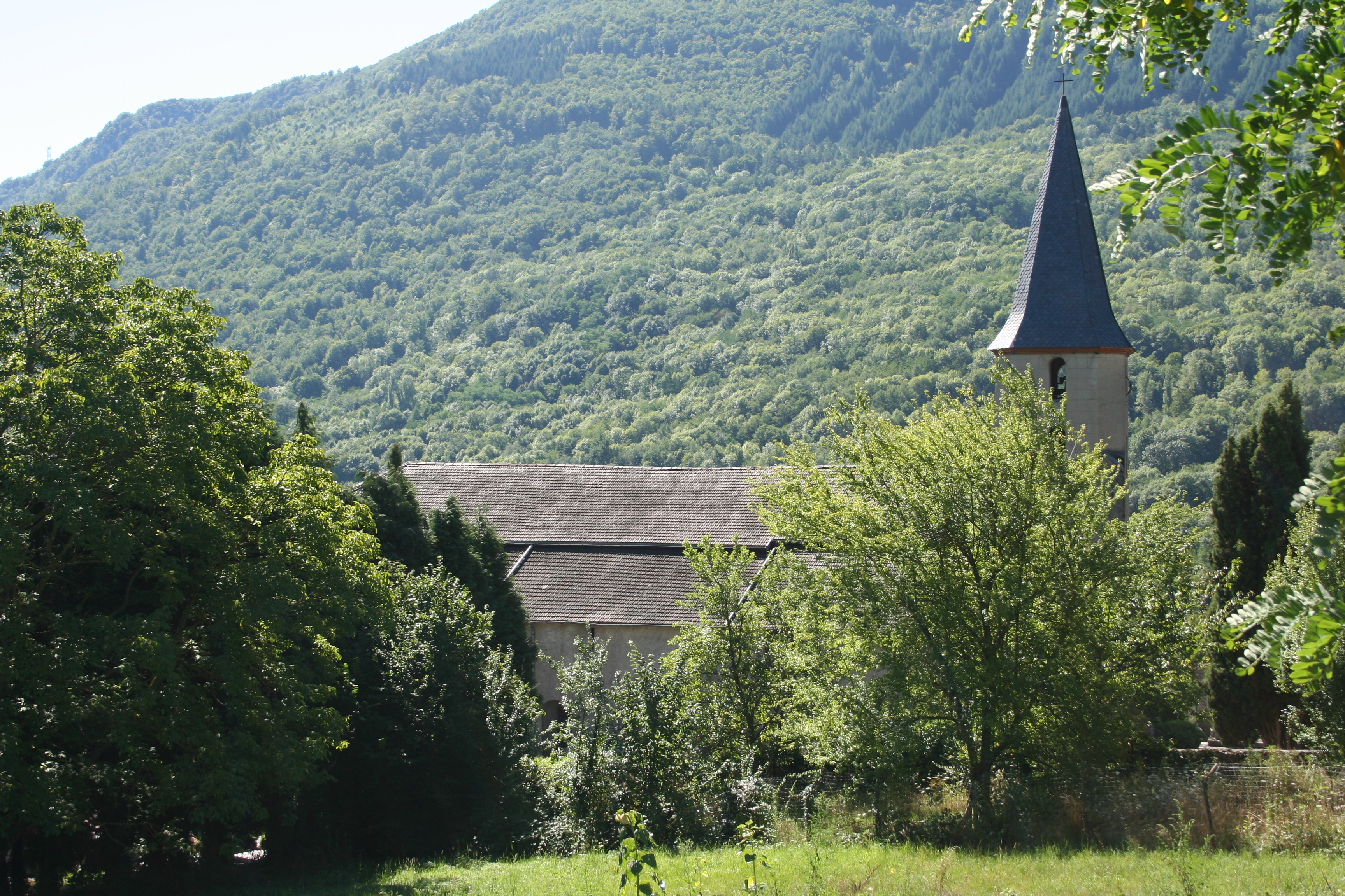 Eglise de Rabat vue depuis le chemin de Bedeilhac